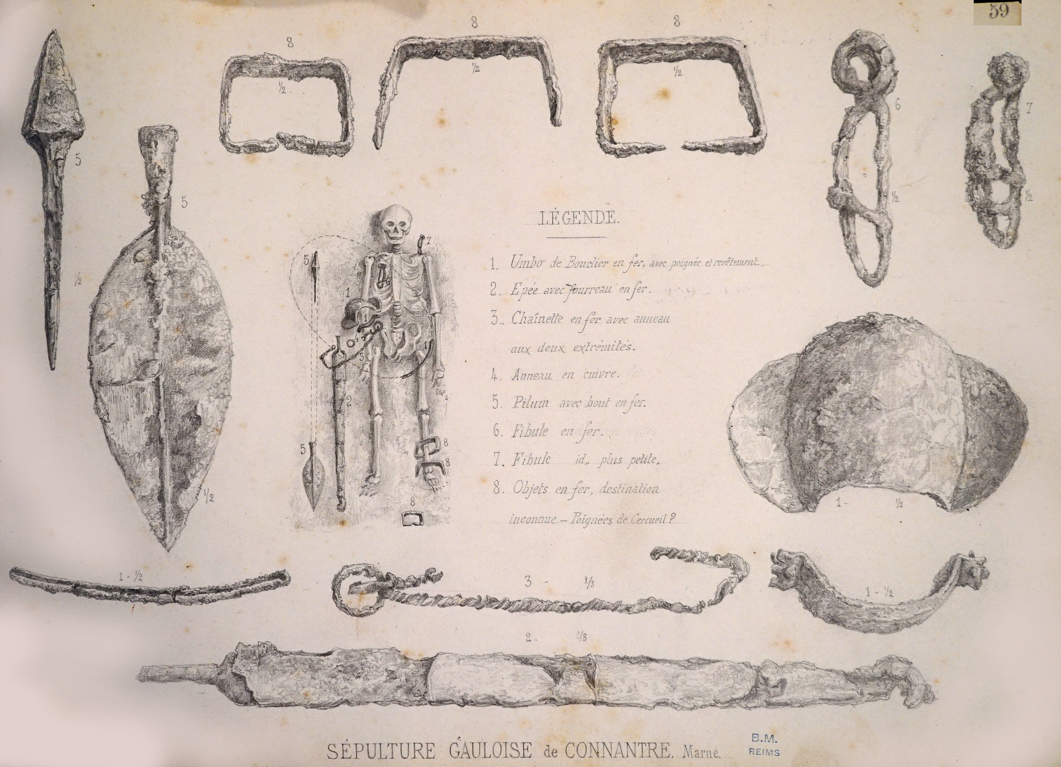 fouilles Morel.